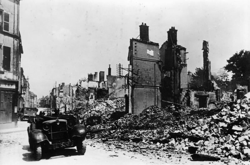 This description has been identified as biased or incorrect: Le 10 juin 1940, durant la bataille de France, le centre-ville Châlons-en-Champagne, nommée Châlons-sur-Marne de la fin du XVIIIe siècle jusqu'à l'année 1995, est bombardé par la Luftwaffe causant la mort de 44 victimes civiles et d'une trentaine de militaires logeant chez l'habitant et la destruction de 150 maisons. La ville est occupée le 12 juin 1940.Scherl: Frankreich: Zerstörter Häuserblock in Chalons sur Marne. PK-Böhmer-Scherl Bilderdienst. 7096-40 "Fr" OKW Juni 1940